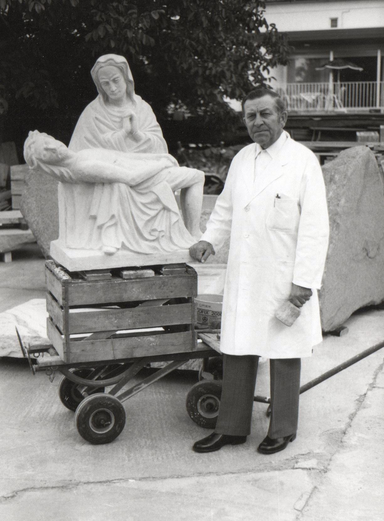 Heinrich Sprick und die Pieta